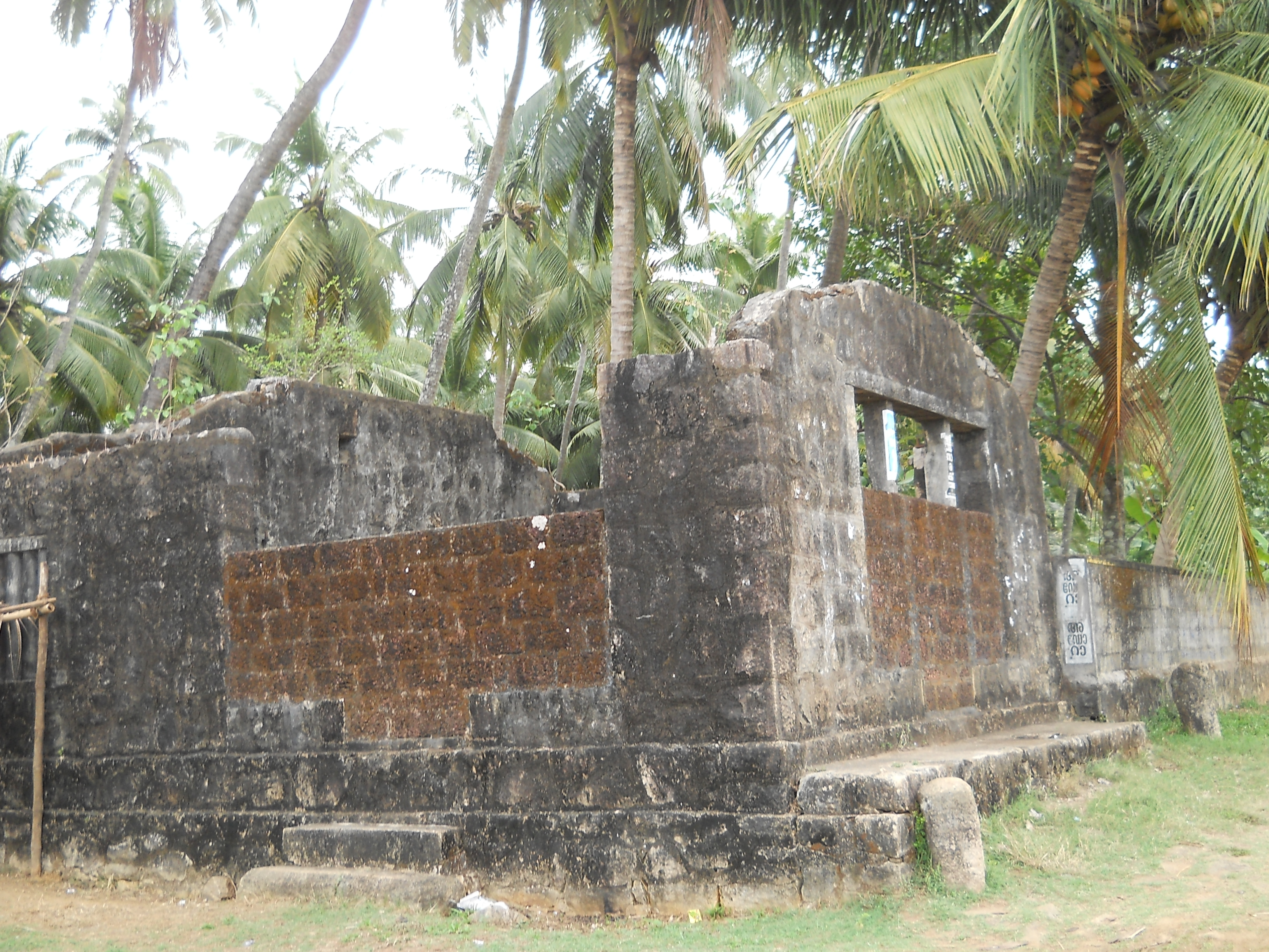 വഴിപോക്കർക്ക് വെള്ളം കുടിക്കാനുള്ള സ്ഥലത്തിനു തണ്ണീർപ്പന്തൽ എന്നു പറയുന്നു. കേരളത്തിൽ ഇവ തണ്ണീർപ്പന്തൽ എന്നാണറിയപ്പെടുന്നത്. വഴിയമ്പലങ്ങൾ ദാഹമകറ്റാനും വിശ്രമിക്കാനും ഇടം നൽകുന്നുവെങ്കിൽ തണ്ണീർപ്പന്തലുകൾ ദാഹമകറ്റാൻ മാത്രമുള്ള വഴിയോര സംവിധാനമാണ്. വഴിയമ്പലങ്ങളിലും തണ്ണീർപ്പന്തലുകൾ ഉണ്ടായിരിക്കും. പൊതുവേ വഴിയമ്പലങ്ങൾ ഇല്ലാത്ത സ്ഥലത്താണ് താത്ക്കാലിക തണ്ണീർപ്പന്തലുകൾ നിർമിക്കുന്നത്. താത്ക്കാലികമായ ഓലപ്പന്തലുകളാണിവ. ഇവിടെ ദാഹമകറ്റാനുള്ള ജലവും പാനീയങ്ങളും വിൽക്കുകയല്ല, സൗജന്യമായി നൽകുകയായിരുന്നു പതിവ്. പച്ചവെള്ളം പോലെതന്നെ തണ്ണീർപ്പന്തലുകളിലെ പ്രധാന വിഭവമായിരുന്നു സംഭാരം അഥവാ മോരുംവെള്ളം. മോരും വെള്ളവും ചേർത്ത് അതിൽ നാരകത്തില, ഉപ്പ്, മുളക് എന്നിവയും കൂട്ടിയാണ് തണ്ണീർപ്പന്തലുകളിലൂടെ ജനങ്ങൾക്ക് വെള്ളം നൽകിയിരുന്നത്. തണ്ണീർപ്പന്തലിലെ മോരുംവെള്ളത്തിൽ പലപ്പോഴും മോര് പേരിനു മാത്രമുണ്ടായിരിക്കും എന്നുള്ളതുകൊണ്ടാകണം കൊഴുപ്പില്ലാത്തത്, കട്ടിയില്ലാത്തത് തുടങ്ങിയ അർഥങ്ങളിൽ മോരുവെള്ളം എന്ന പ്രയോഗവും നിലവിൽ വന്നത്. അടാട്ട് കുറൂർ പാറയ്ക്ക് അടുത്തുണ്ടായിരുന്ന ഒരു തണ്ണീർപന്തലിന്റെ ബാക്കി.